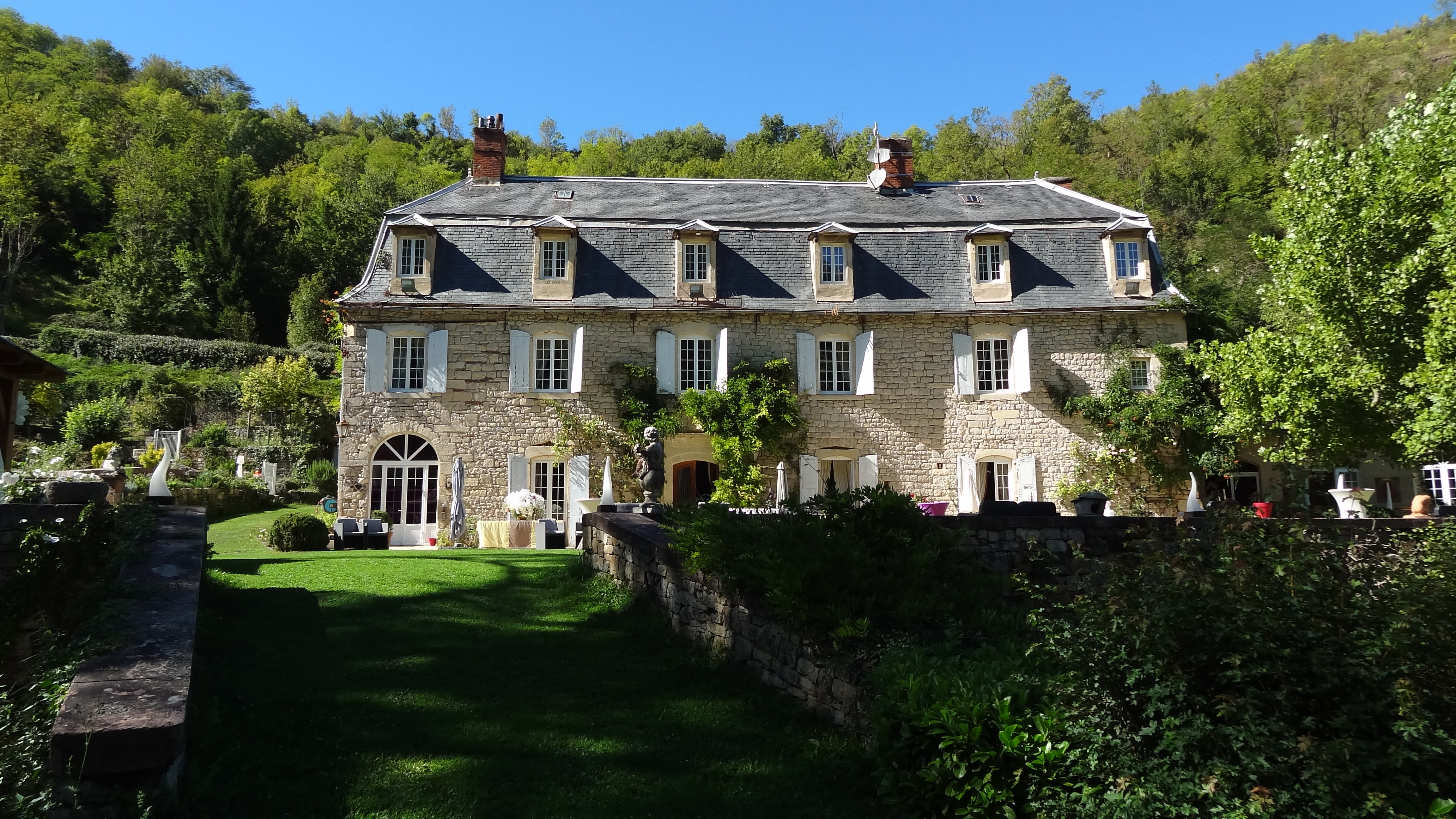 L'ancien prieuré de Las Canals re-conditionné en lieu de réception et de gîte